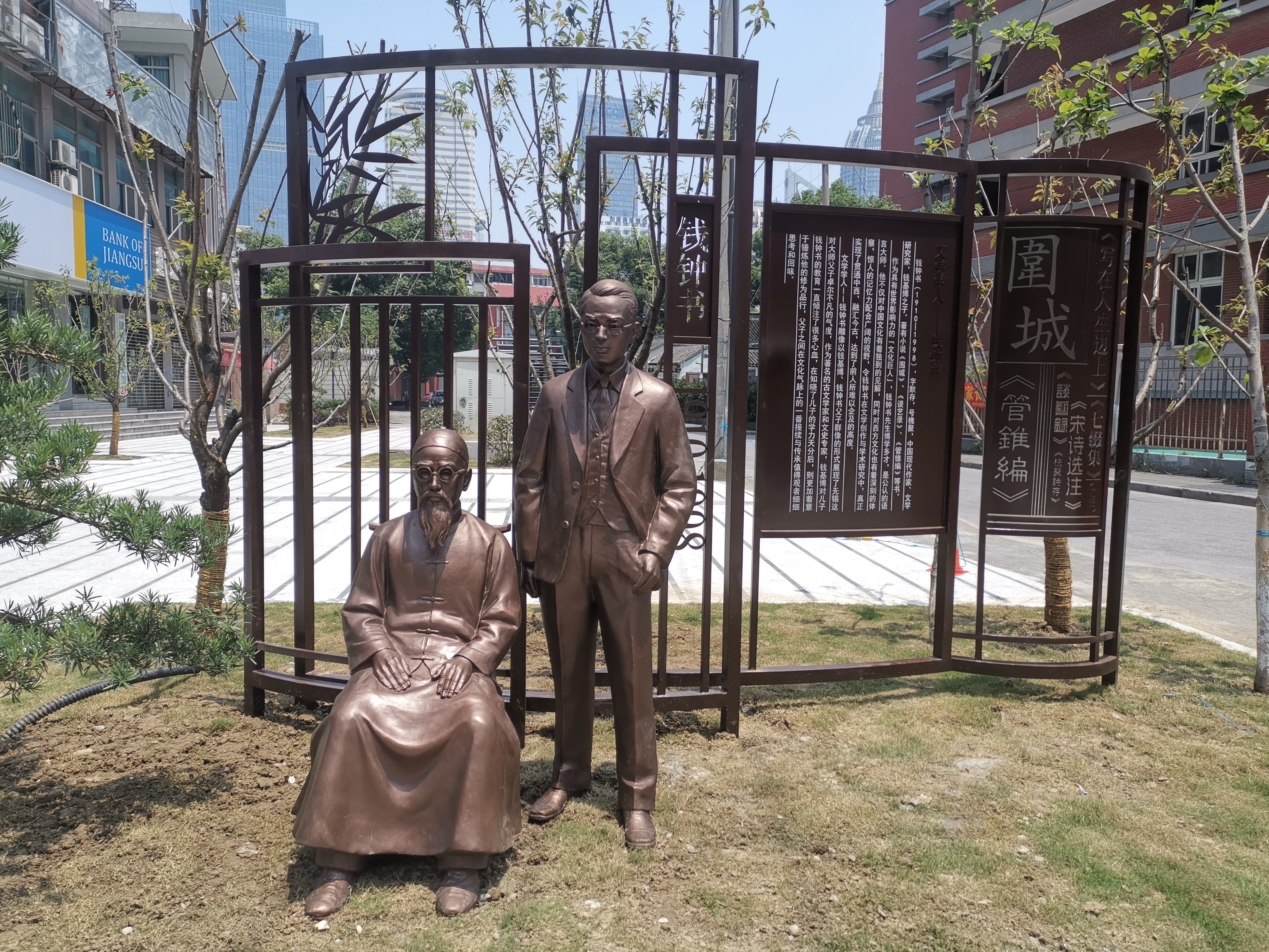 无锡学前街